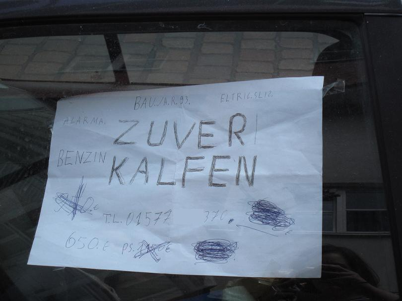 Zettel an einem Auto mit Anzeichen von funktionalem Analphabetismus